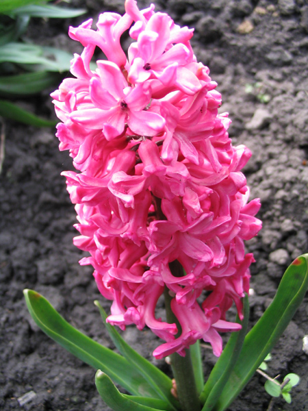 Hyacinthus